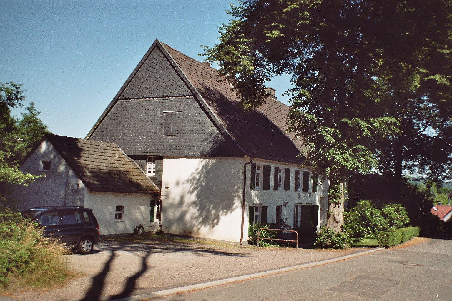 (vermeintliches) Geburtshaus von Henriette Davidis in Wengern, Wetter (Ruhr), Deutschland